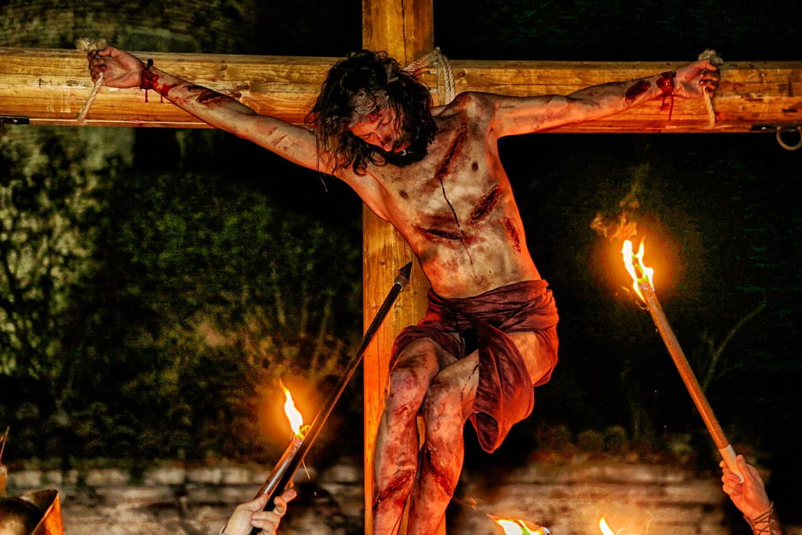 Davide Mindo nel Ruolo di Gesù Cristo nella Sacra Rappresentazione Medievale della Passione di Cristo di Ivrea